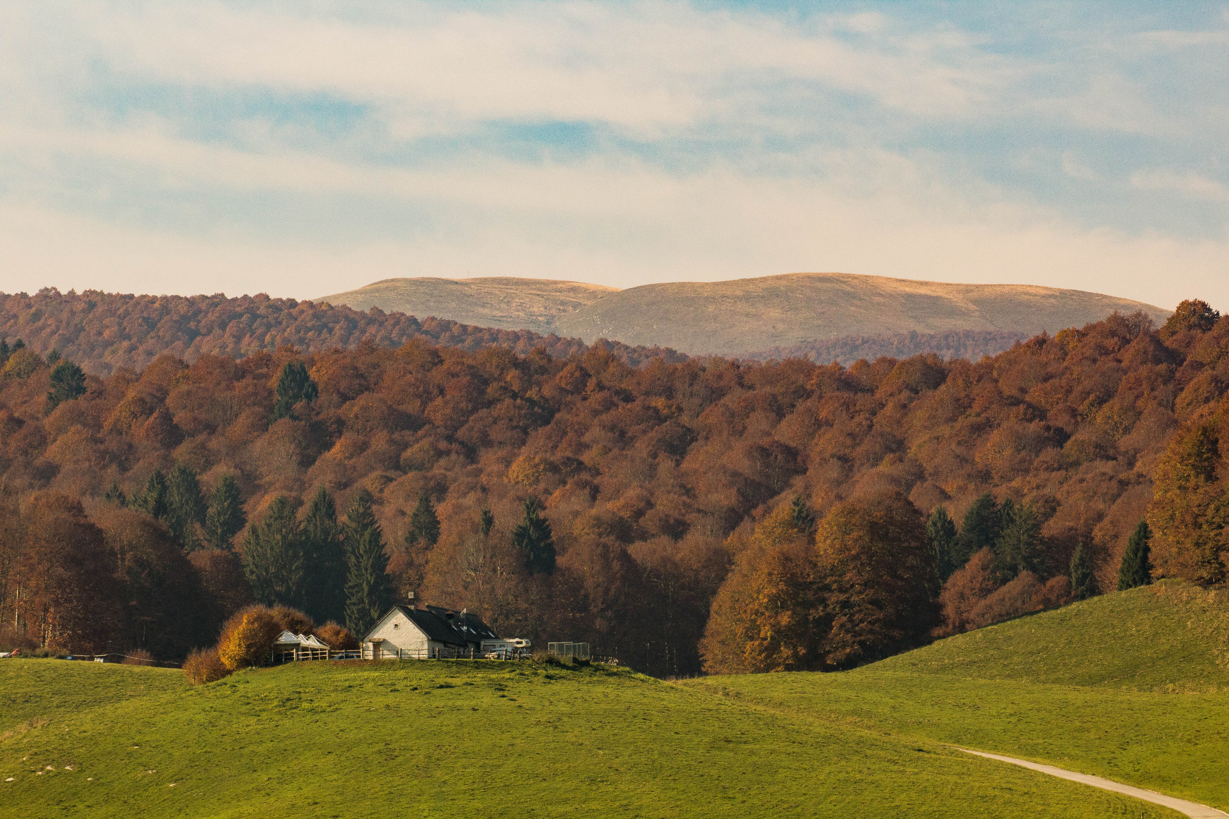 Foresta del Cansiglio (Q47494652)